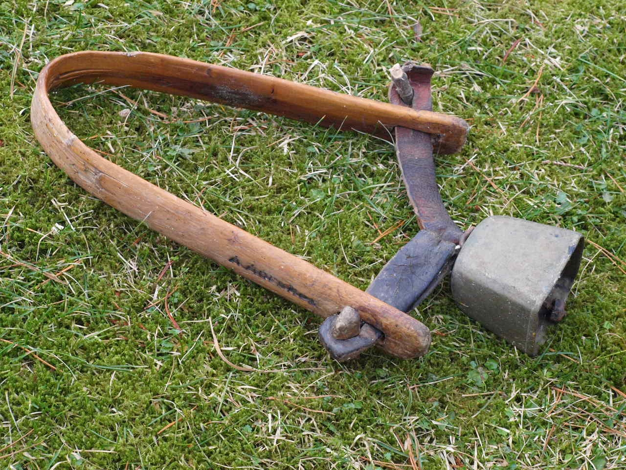 Kuklave av tre med bjølle